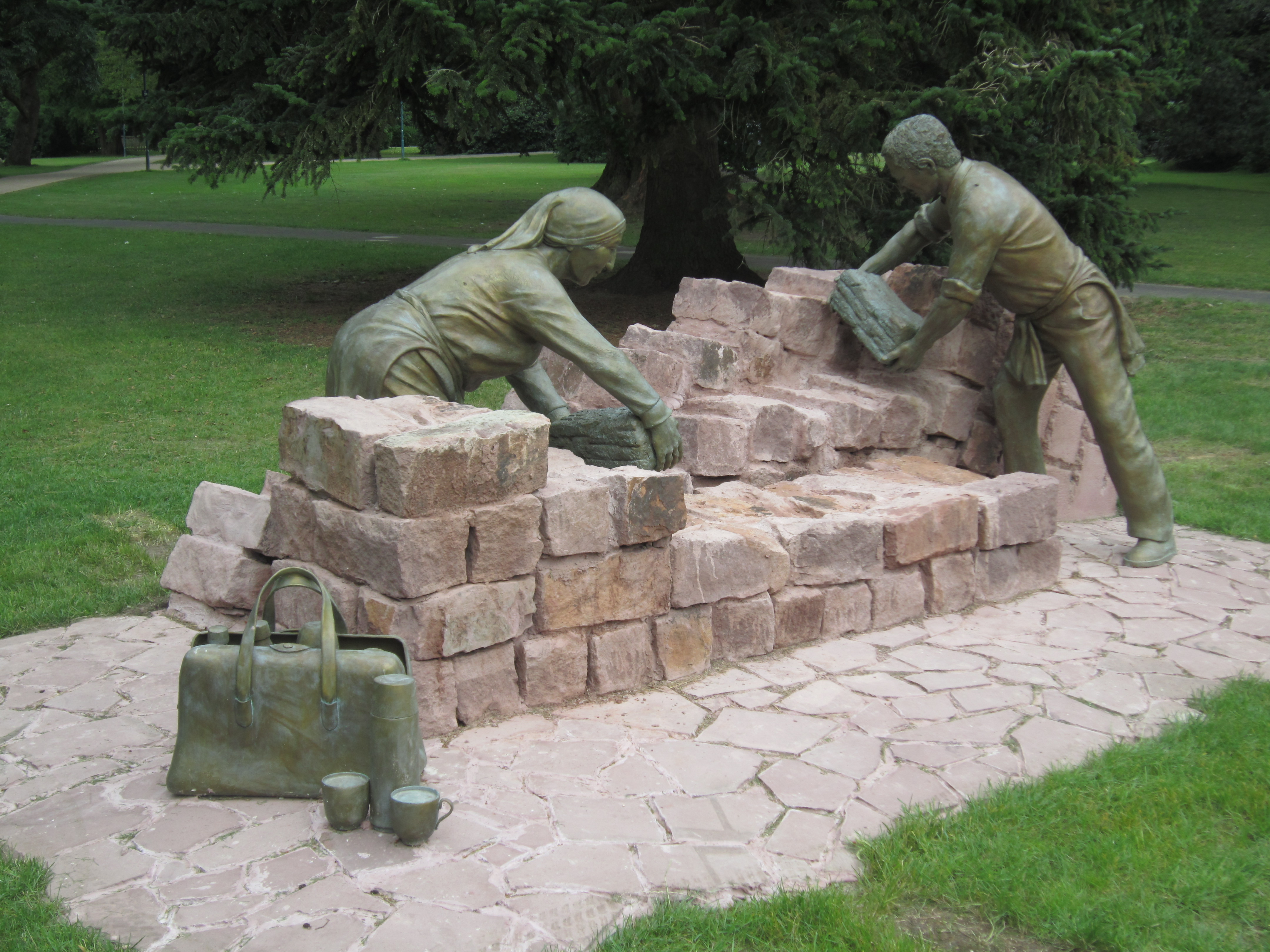 Bronzeskulptur "Zwei Moorarbeiter" von Bernd Maro, 2020 im Stadtpark von Lohne (Landkreis Vechta / Niedersachsen) aufgestellt. Die Skulptur ehrt die Bereitschaft von türkischen Arbeitsmigranten, aber auch Arbeitsmigrantinnen zu schwerer körperlicher Arbeit in den Mooren im Osten Lohnes seit den 1960er Jahren.